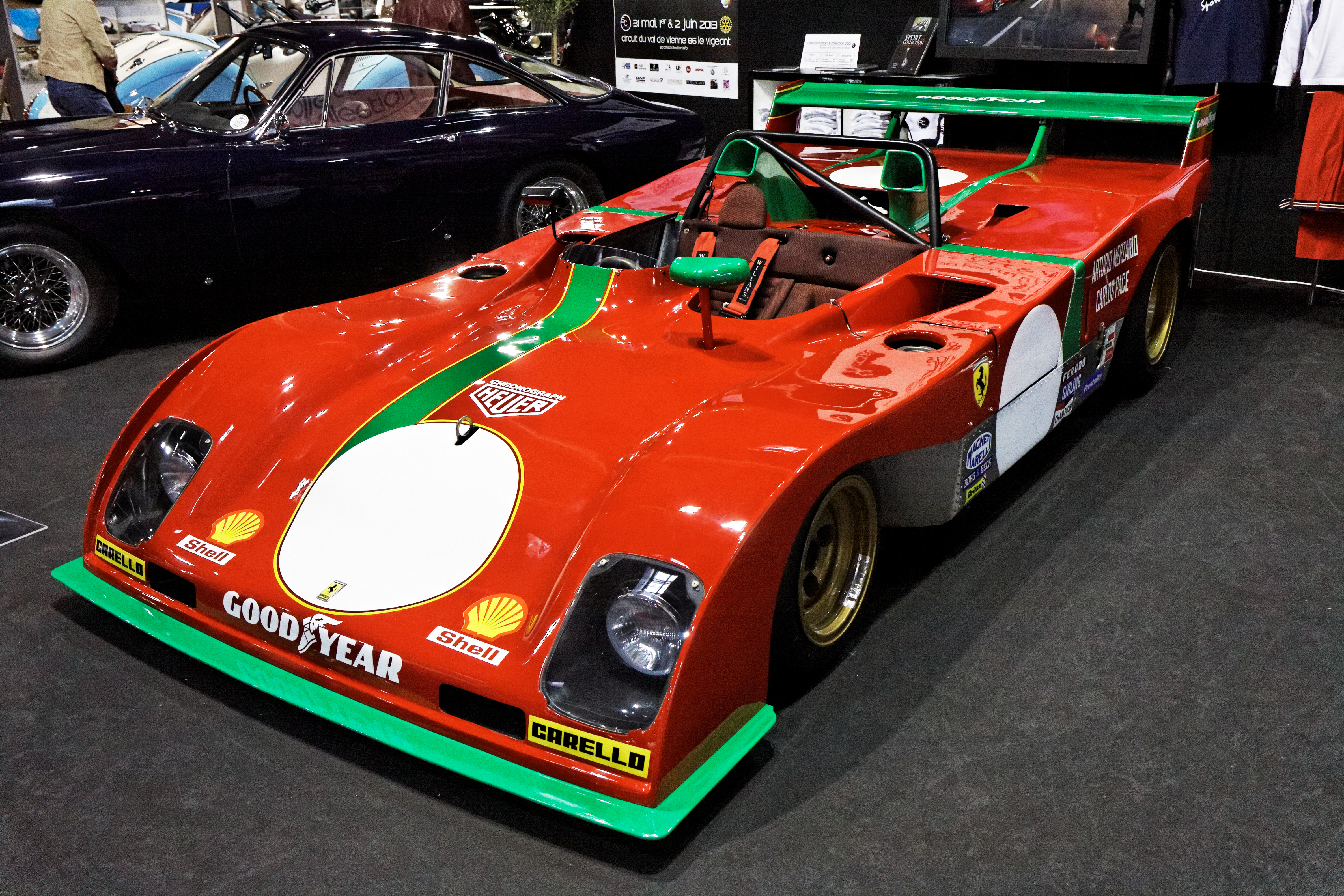 Une Ferrari 312 PB présentée lors du salon Retromobile 2013.